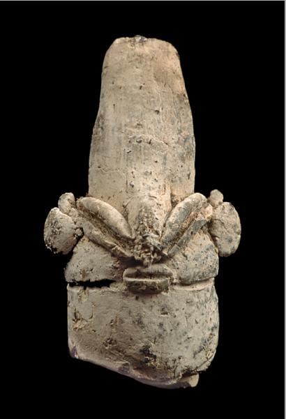 The Yarmukian Culture is a Neolithic culture of the ancient Levant. It was the first culture in Prehistoric Israel and one of the oldest in the Levant to make use of pottery. The Yarmukian derives its name from the Yarmouk River which flows near its type site at Sha'ar HaGolan, a kibbutz at the foot of the Golan Heights. The pictures are fromYosef Garfinkel excavations taken between 1989-1990 & 1998-2004 התרבות הירמוכית היא תרבות מהתקופה הניאוליתית הקרמית שמרבית שרידיה נתגלו באיזור שדות שער הגולן, והיא קיבלה את שמה על שם נהר הירמוך הזורם בסמוך. התמונת הן מחפירות שנערכו בשער הגולן על ידי הארכאולוגי יוסי גרפינקל מהאוניברסיטה העברית . נערכו 2 עונות חפירה 1990-1989, ו 1996-2004. ראש צלמית מקרמיקה